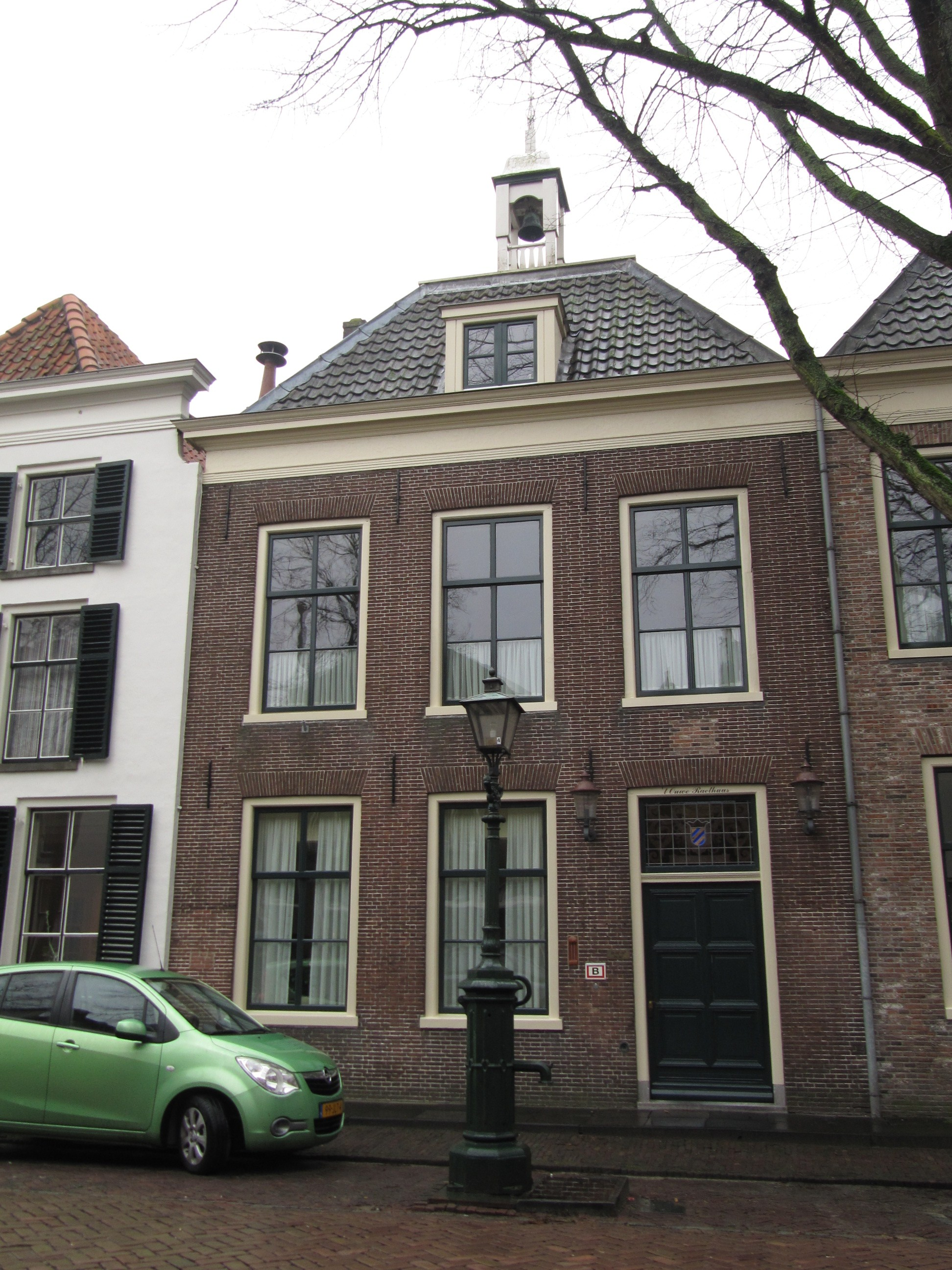 RM29871 Sommelsdijk - Voorstraat 22.jpg